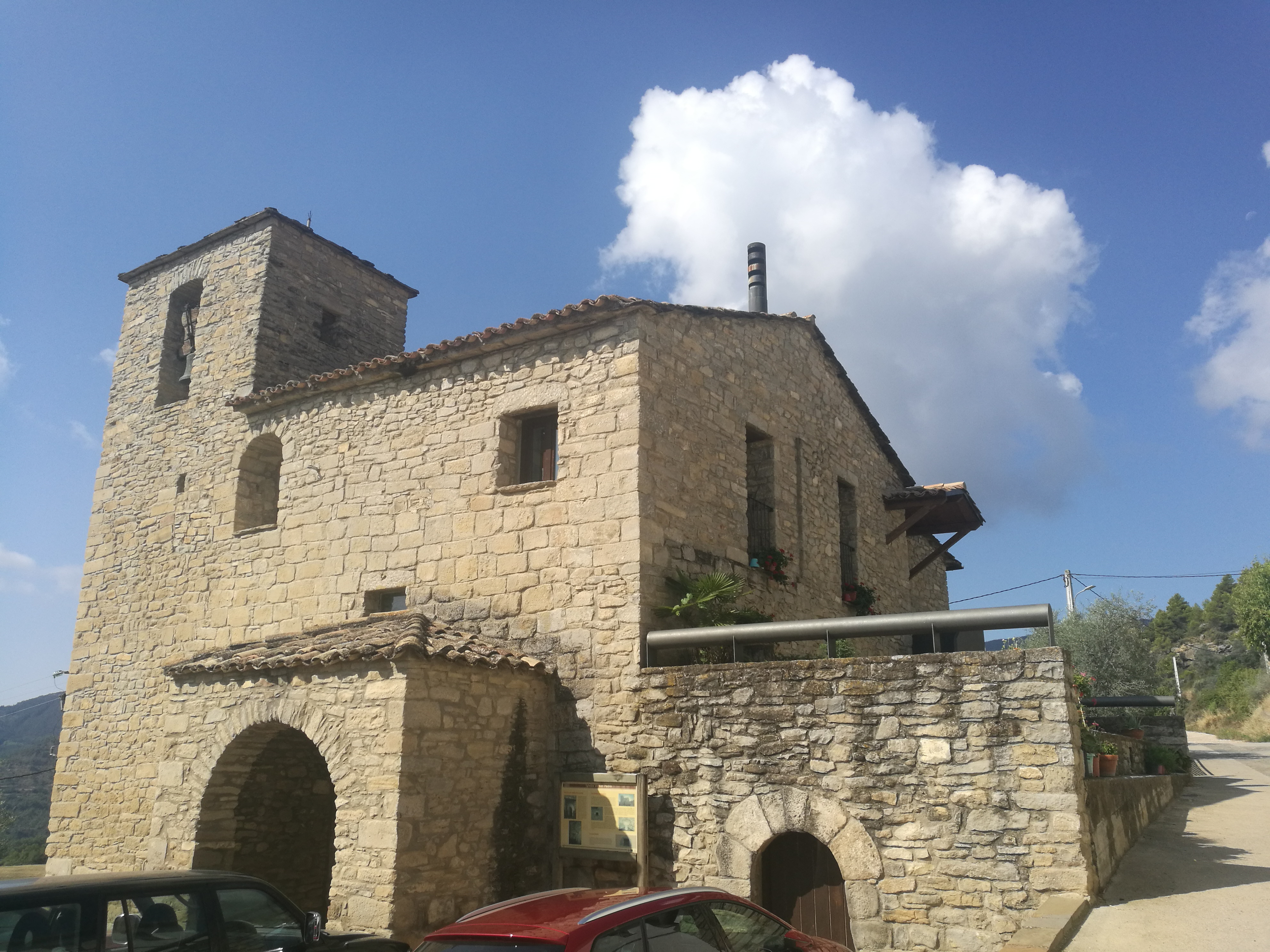 Ejep (Ixep en aragonés bajorribagorzano) es una localidad española perteneciente al municipio de Graus, en la Ribagorza, provincia de Huesca (Aragón).